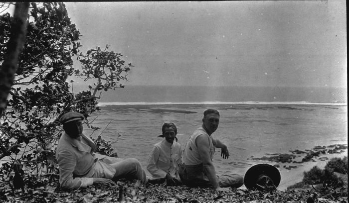 Foto. Het strand op het eiland in de baai van Tjilaoeteureun nabij Pameungpeuk aan de zuidkust van West-Java